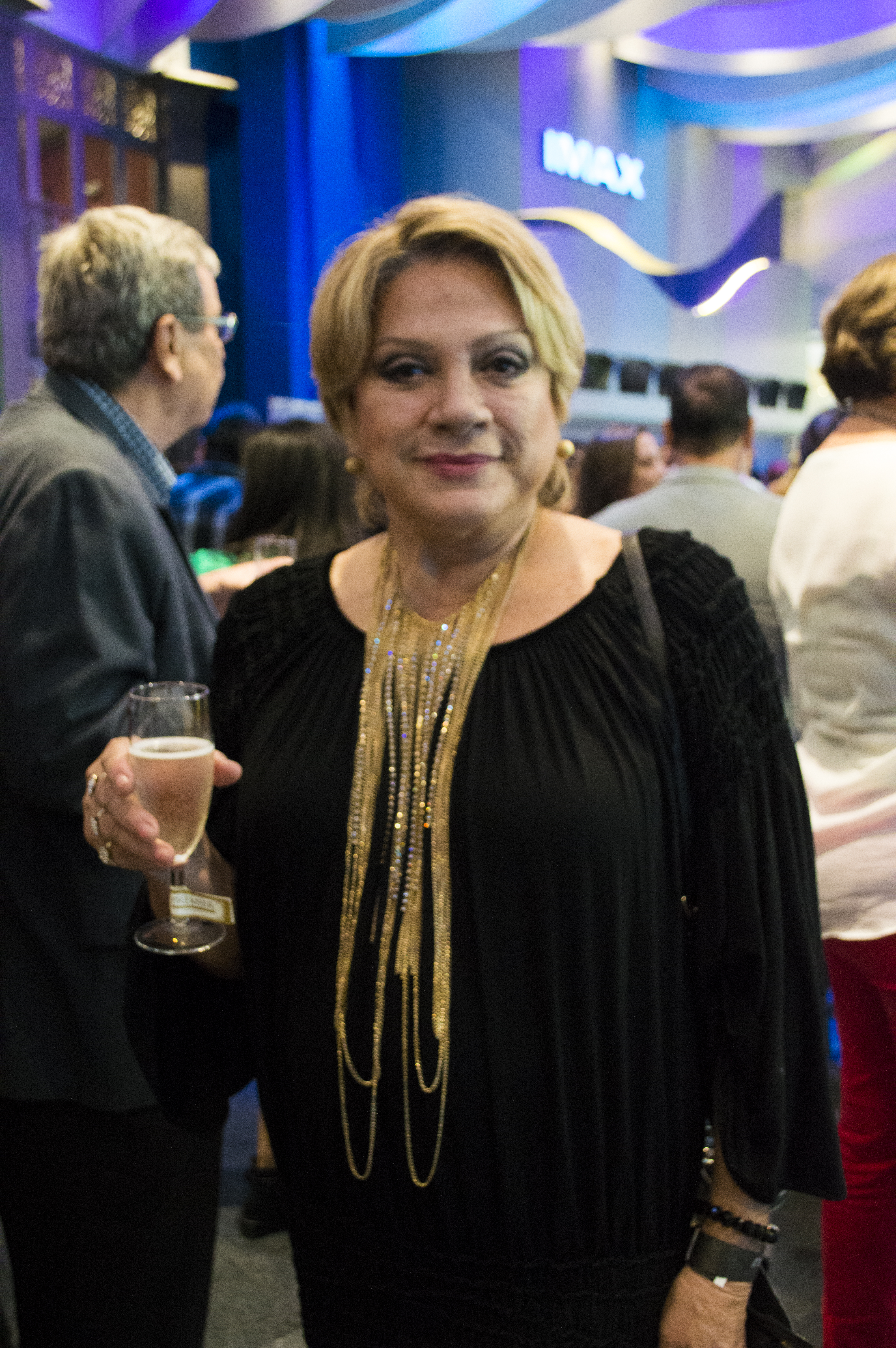 Martha Ontaneda en 2016